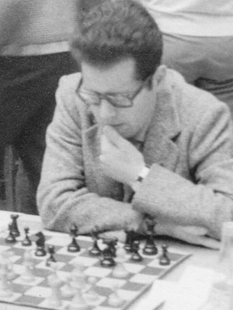 Jean-Claude Letzelter, Open in Straßburg 1972.